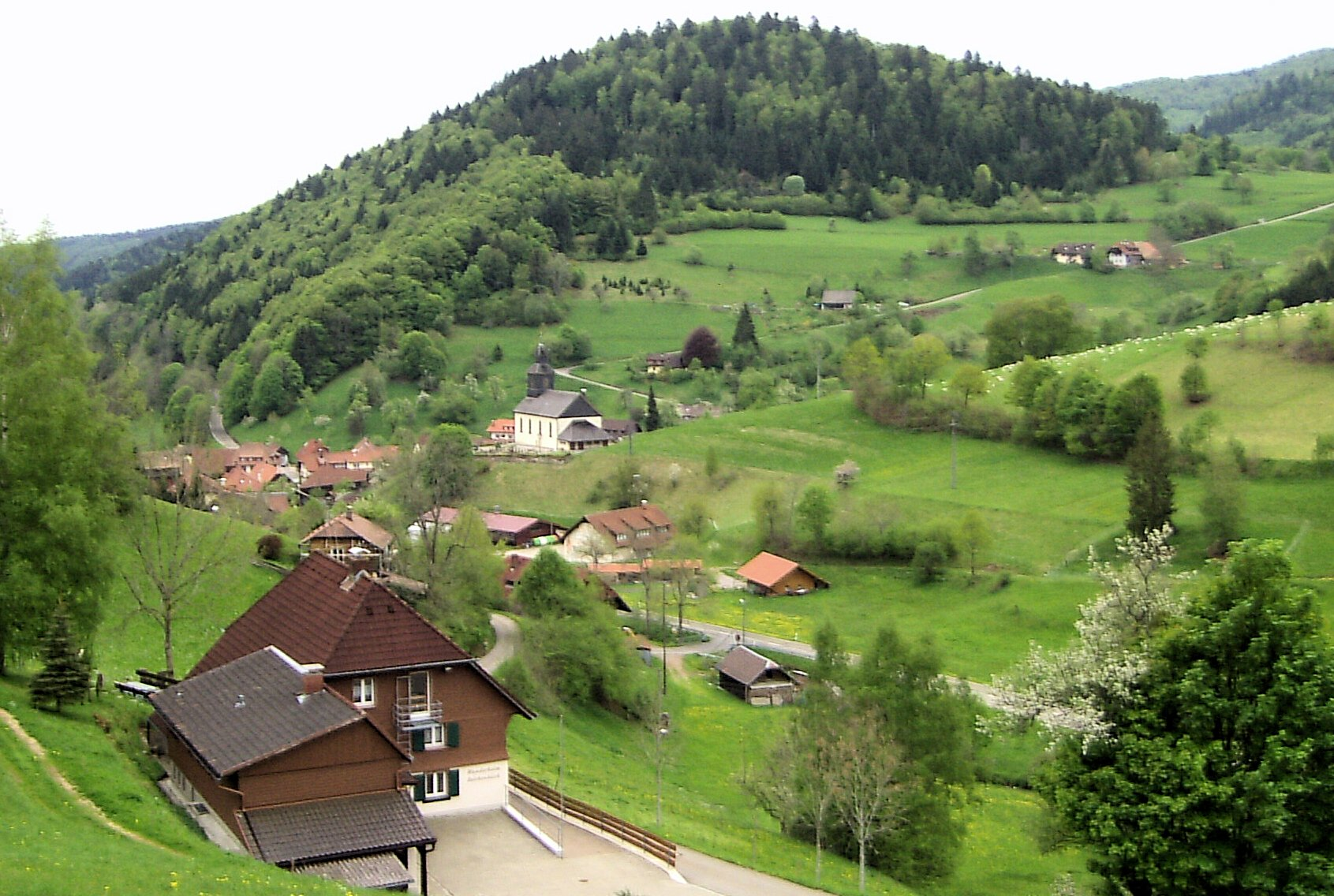 Blick von Nordosten auf Neuenweg, Schwarzwald, Deutschland